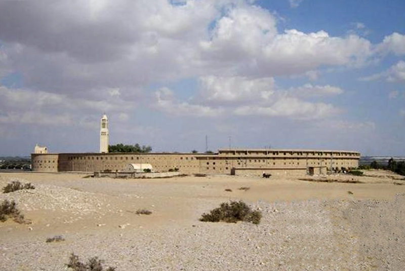 منظر لدير الأنبا مقار من الخارج، وادي النطرون